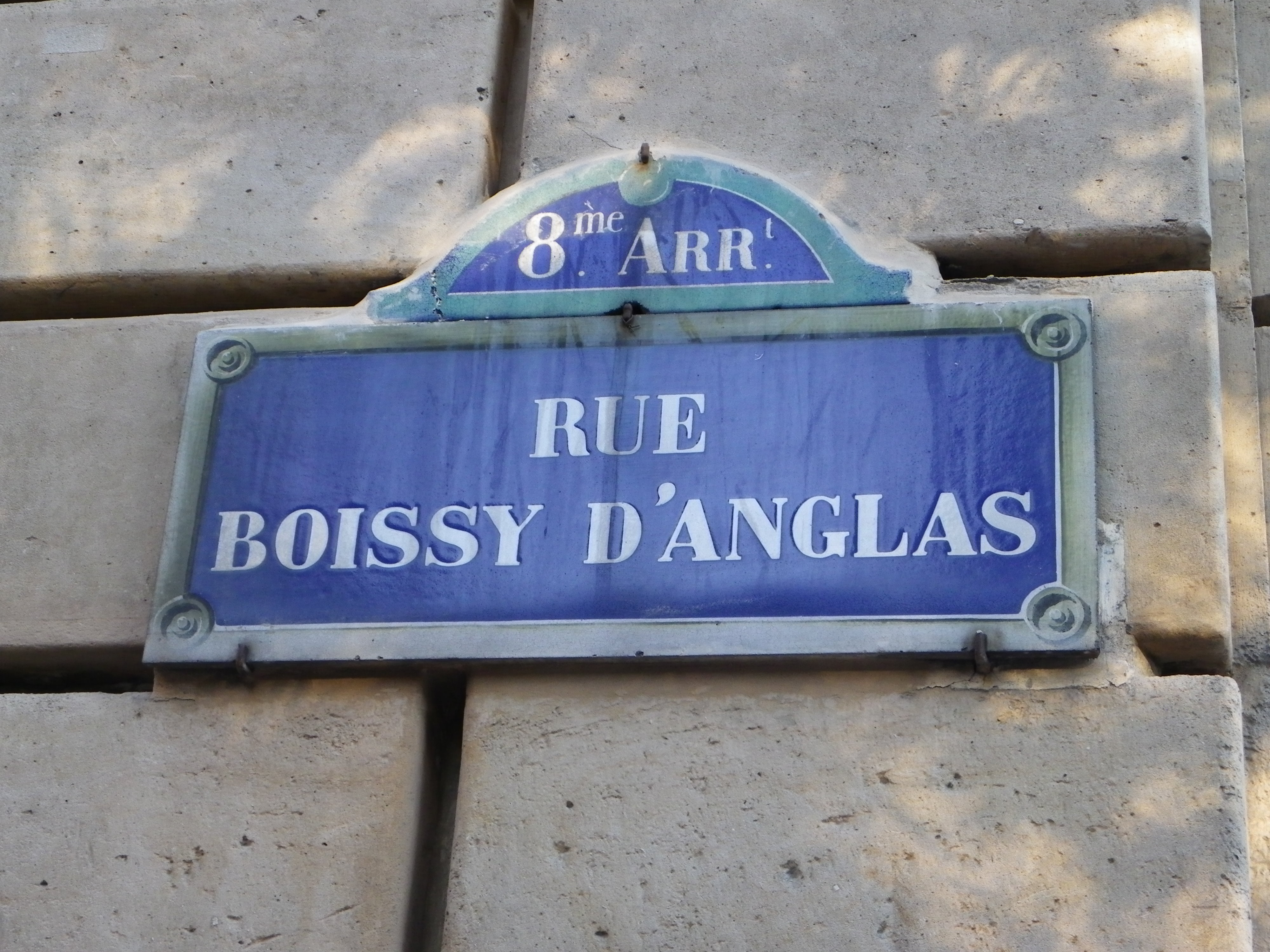 Plaque rue Boissy d'Anglas à Paris